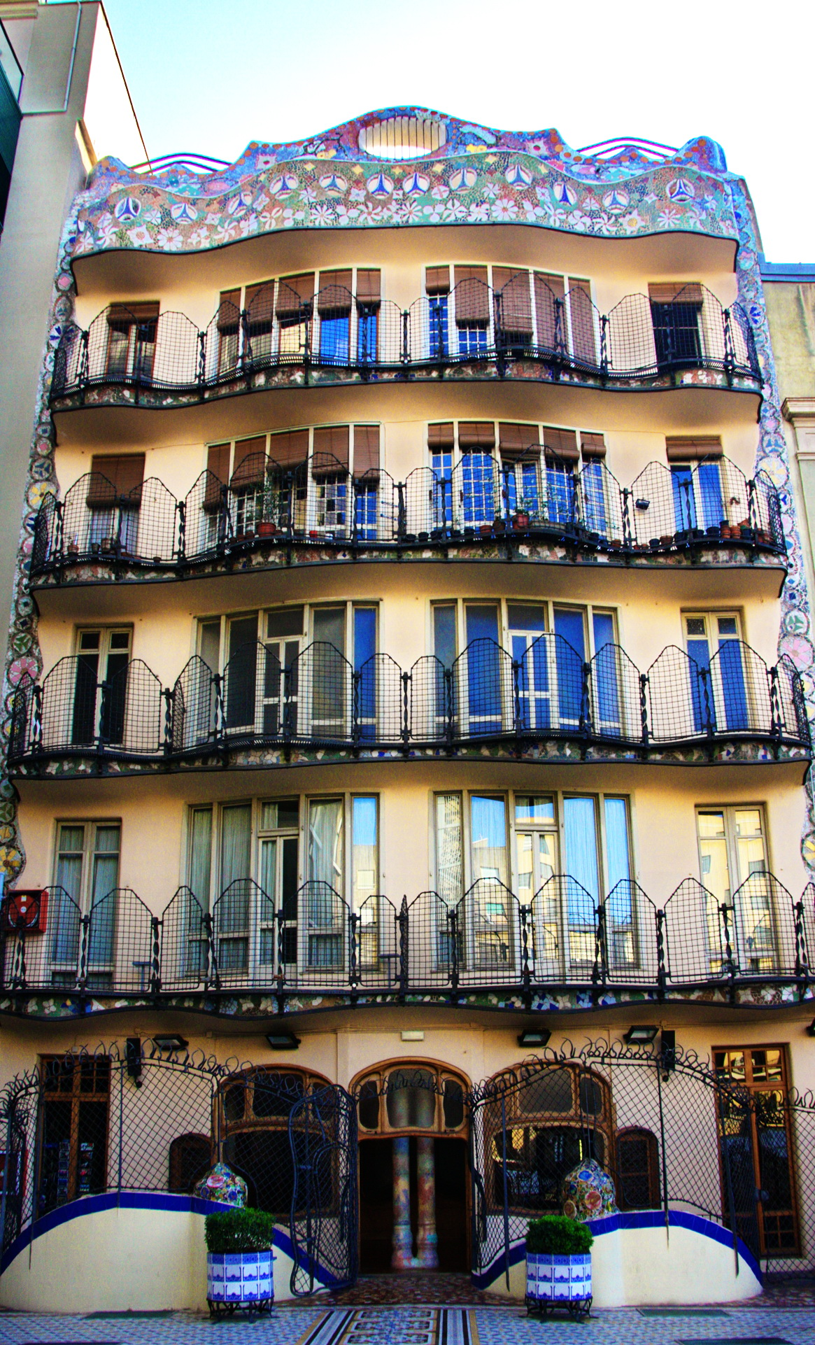 Façana posterior de la casa Batlló (1904-1906). Barcelona, Catalunya.